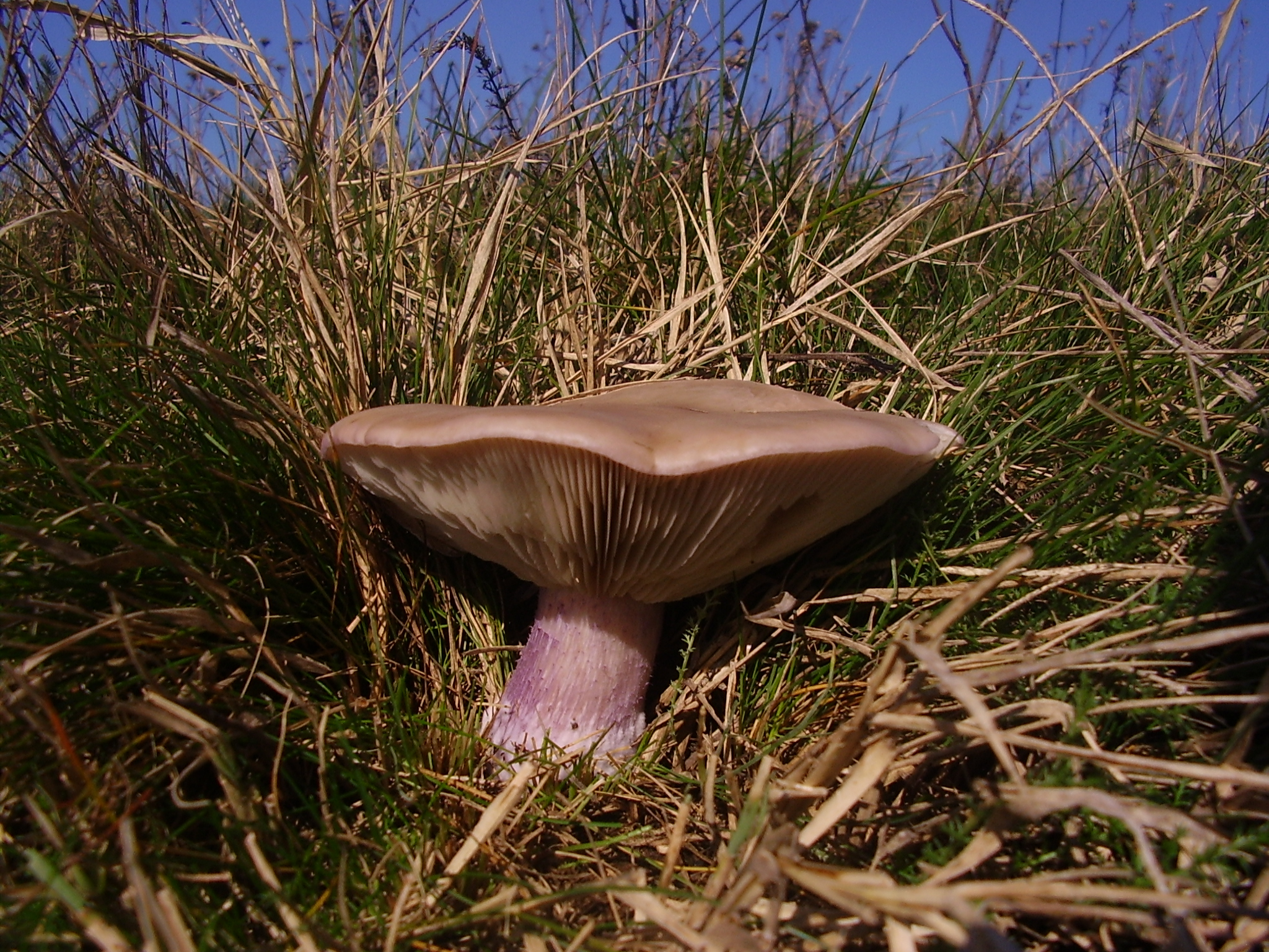 Lepista personata. Near Sofia, Bulgaria.